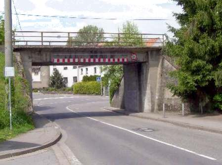 Die alte Eisenbahnbrücke, die 2009 abgerissen wurde. Sie war ein Verkehrsengpass, prägte aber jahrzehntelang das Bild der Ortsmitte von Walpershofen.